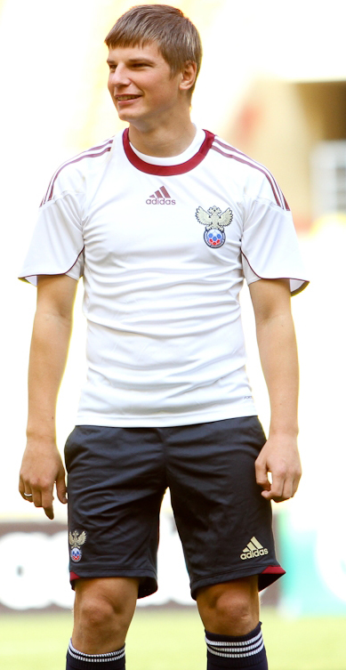 Андрей Аршавин